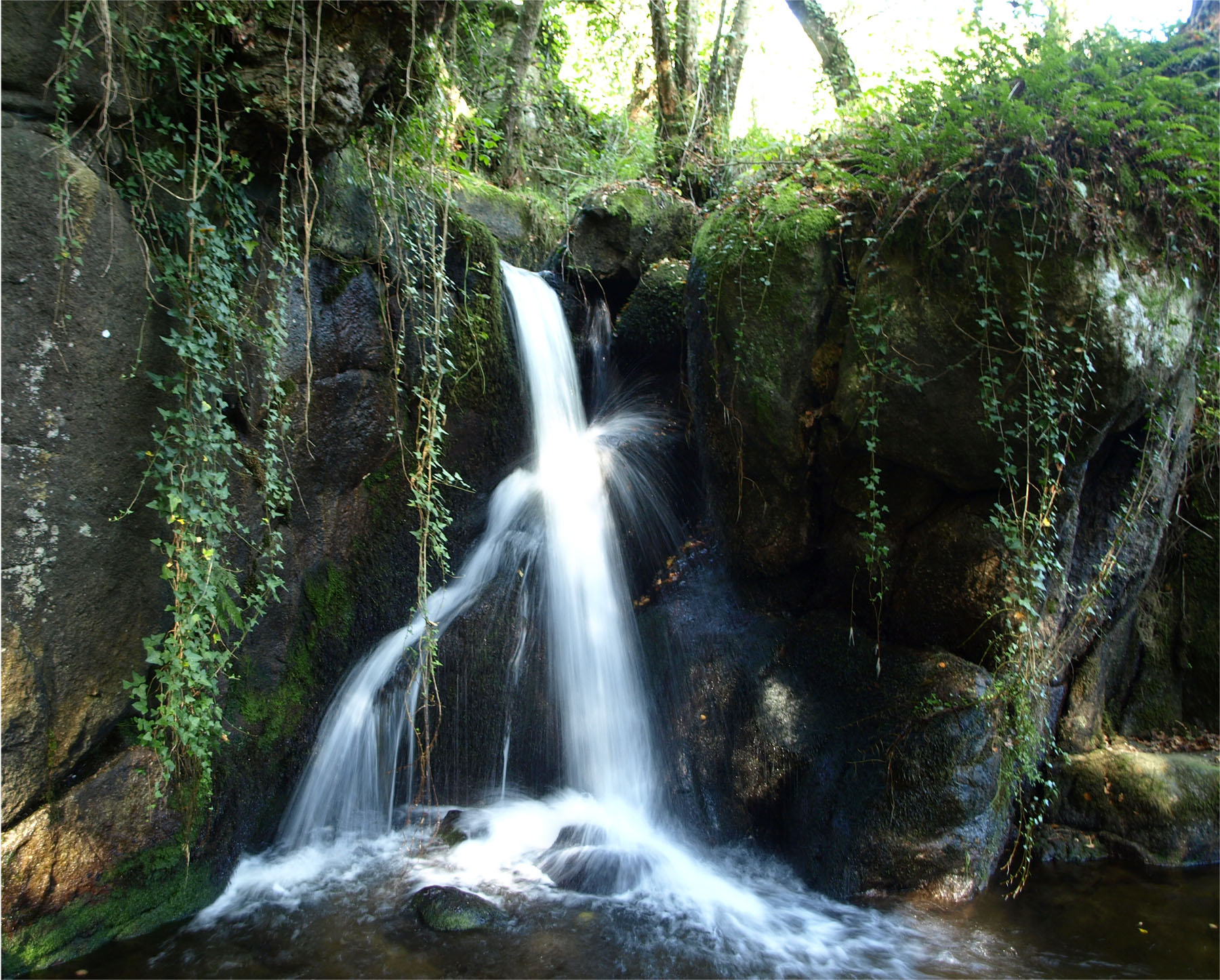 Fervenza de Santiso. Santiso (Antas de Ulla)